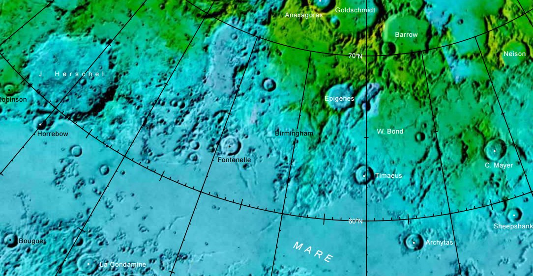 Cráter lunar Fontenelle. Localización. (Imagen LROC)